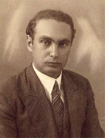 Zdjęcie przedstawia Kazimierza Kalinowskiego dr nauk farmaceutycznych, pracownika naukowego Uniwersytetu Poznańskiego z 1933r.